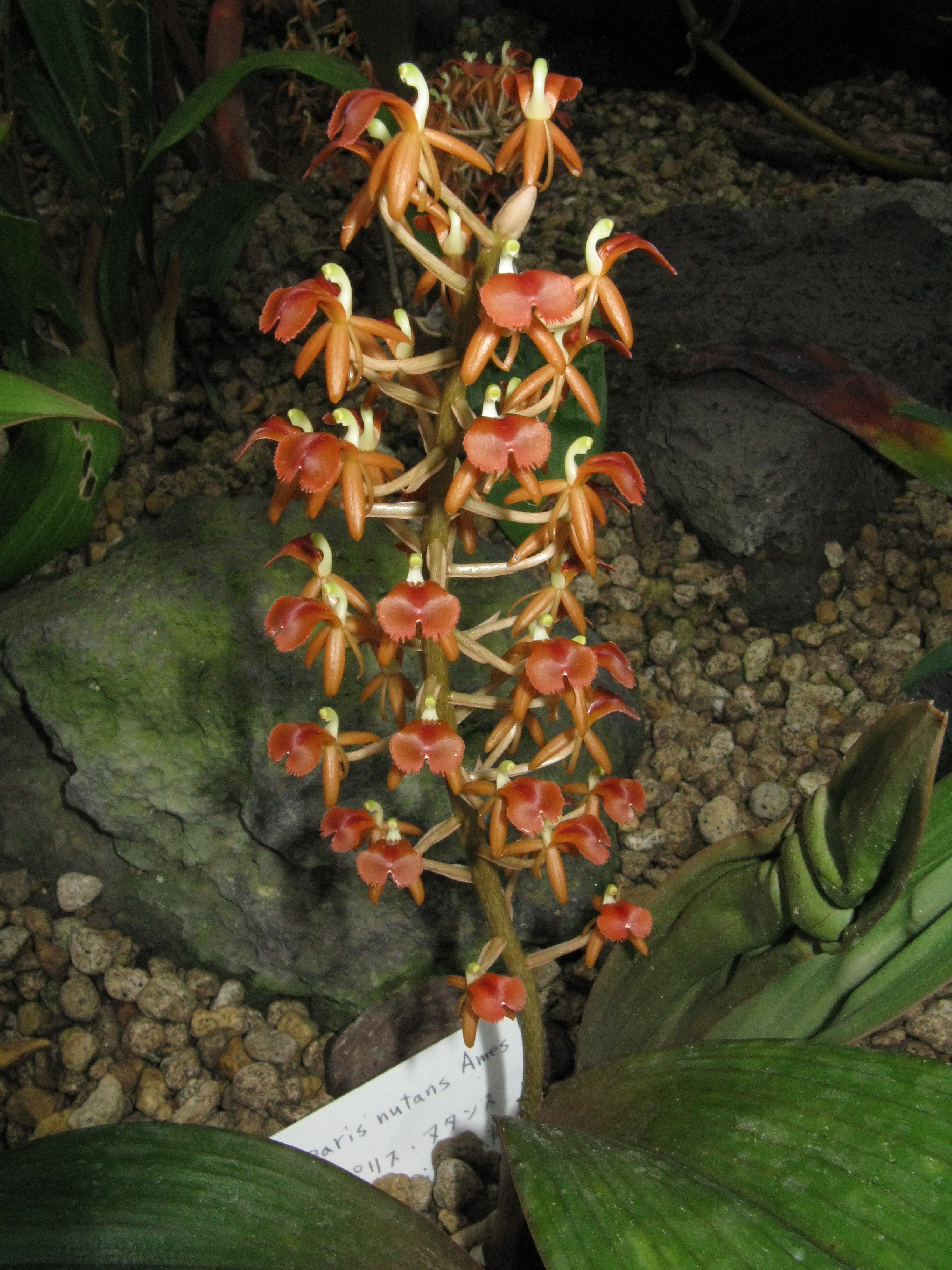 Scientific name Liparis nutans Place:Sakuya Konohana Kan,Osaka,Japan